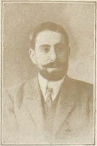 Retrato de Joaquín Sánchez de Toca y Ballester (hijo de Joaquín Sánchez de Toca y Calvo), obra de Manuel Compañy, recogido en la revista española La Ilustración Financiera.